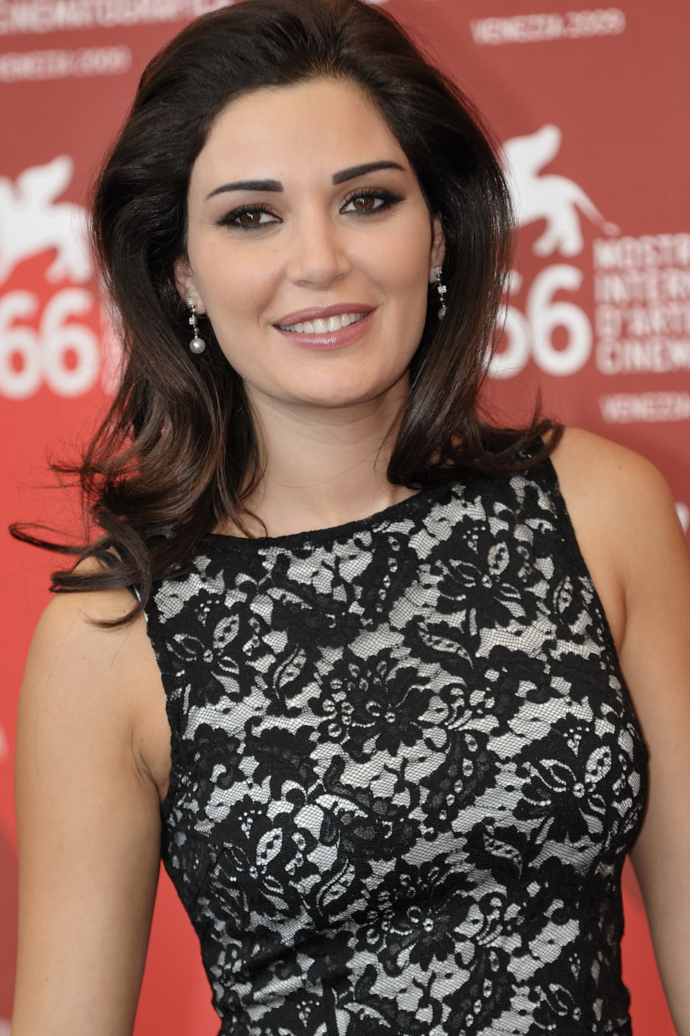 66ème Festival du Cinéma de Venise (Mostra), 9ème jour (10/09/2009) Photocall avec Omar Sharif et Cyrine AbdelNour pour le film The Traveller de Ahmed Maher